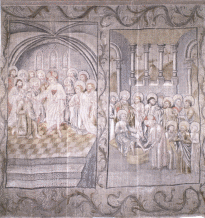 Peinture de la Passion du Christ, Reims - France. Dépôt des hospices de Reims en 1876 (devenus l'hôpital de reims, puis CHU), toile de 1500 anonyme de trempe à la détrempe de 350x340cm d'une série de neuf.